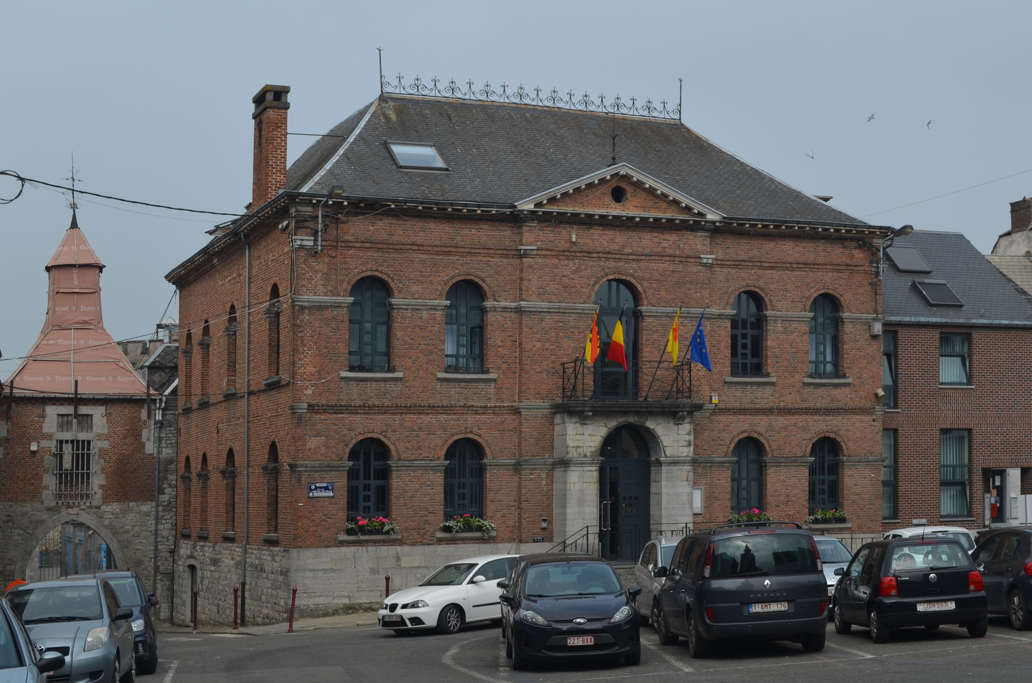 Florennes (Belgique) - Hôtel de Ville construit vers 1840.